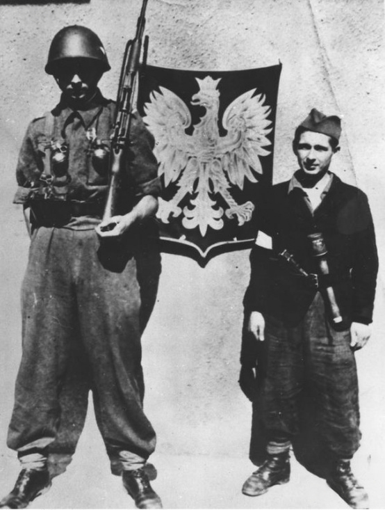 Powstanie Warszawskie. Warta pod sztabem dowódcy powstańczego "Żoliborza" przy ul. Krasińskiego 16. Od lewej pchor. Maciej Dobrucki "Mały" ze Zgrupowania AK Żniwiarz i Tadeusz Mielczarek "Mały" z OW PPS.